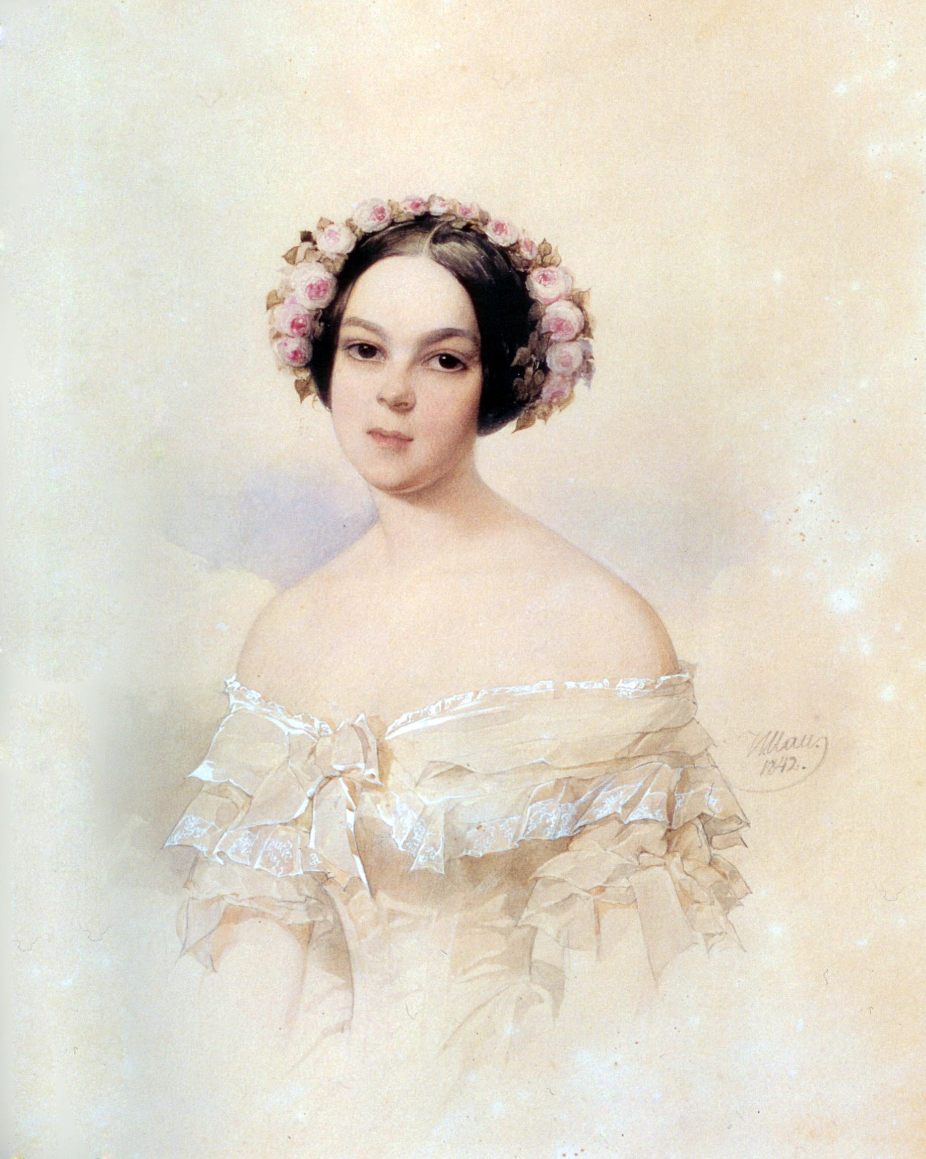 Ольга Николаевна Скобелева (1823-1880), дочь Н.П.Полтавцева от брака с Д.А.Пашковой, была замужем за генералом Д.И.Скобелевым, мать генерала М.Д.Скобелева.